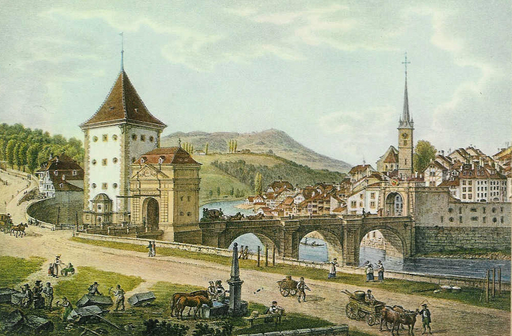 Die Untertorbrücke in Bern.